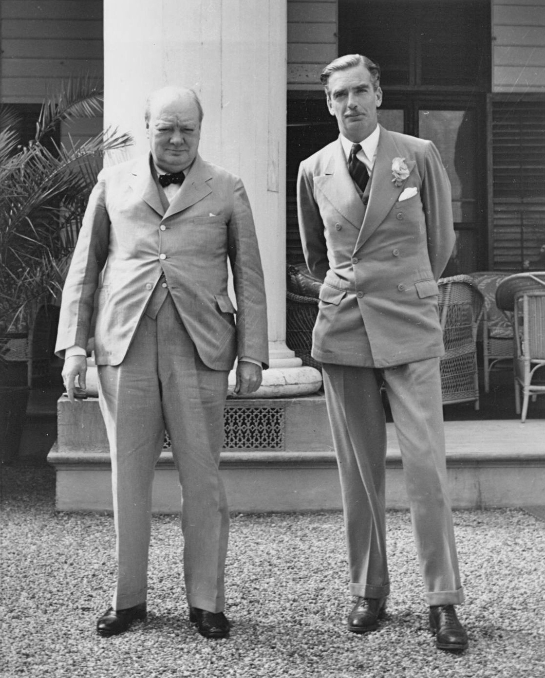 Winston Churchill et Anthony Eden à Spencer Wood, la résidence du lieutenant gouverneur du Québec